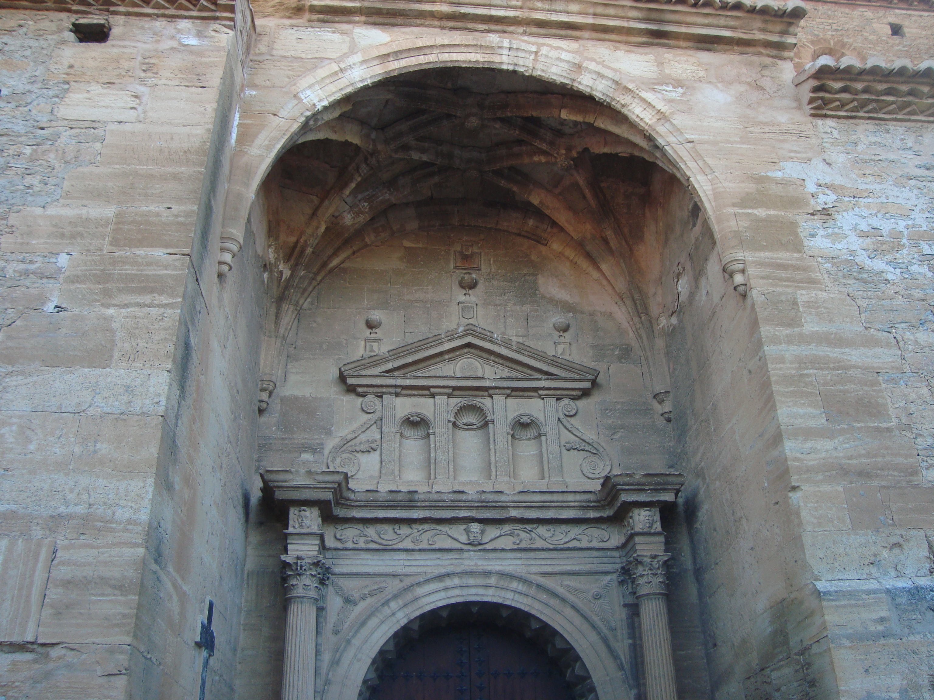 Iglesia de la Asunción